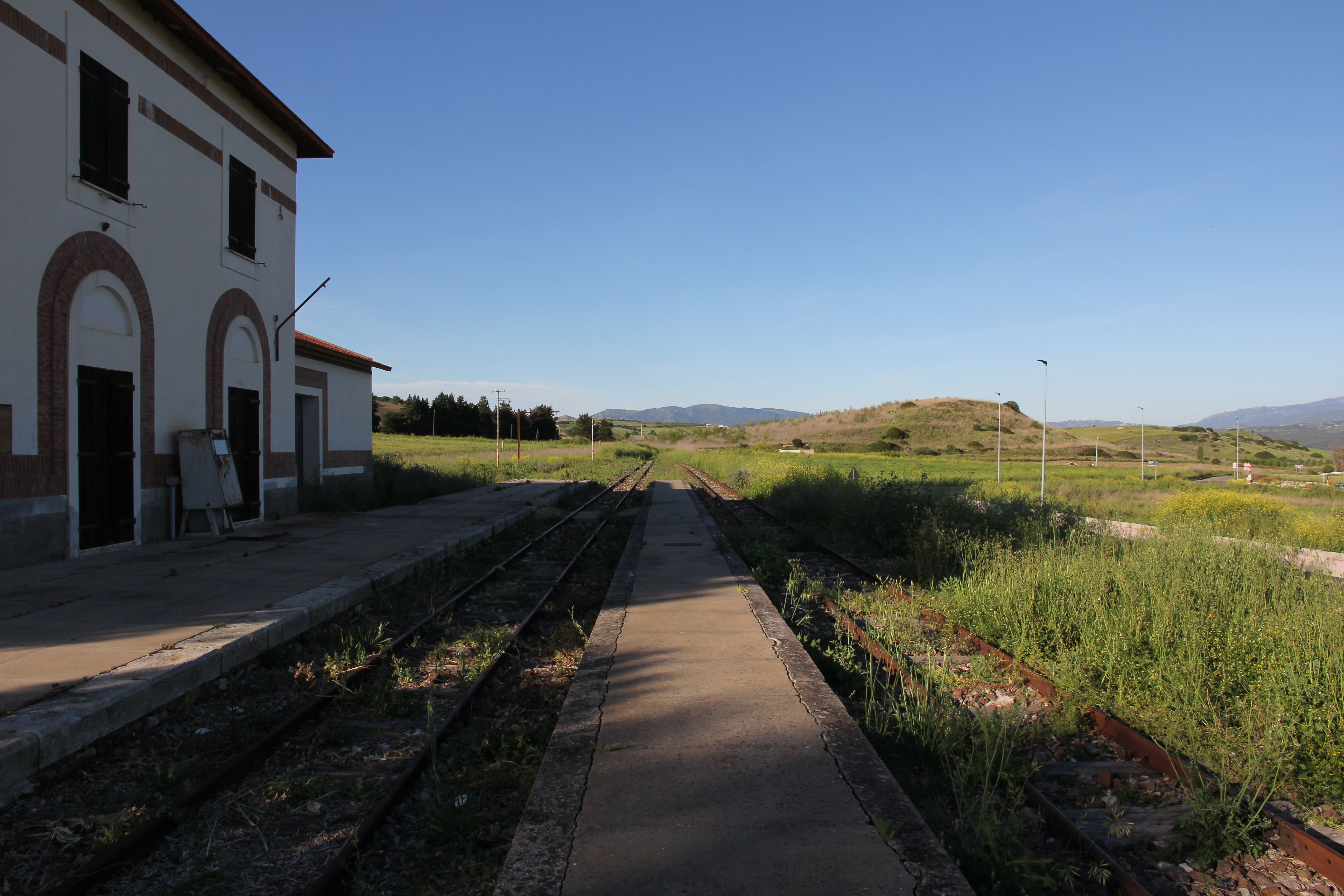 Laerru - Stazione ferroviaria